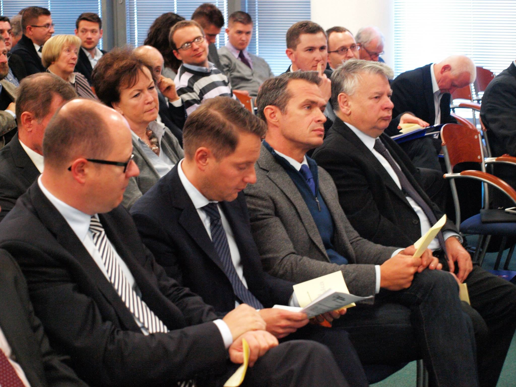 Wybory w Platformie Obywatelskiej - Gdańsk. W pierwszym rzędzie Paweł Adamowicz, Michał Owczarczak, Sławomir Nowak i Bogdan Borusewicz. Z tyłu Hanna Zych-Cisoń i Piotr Grzelak.